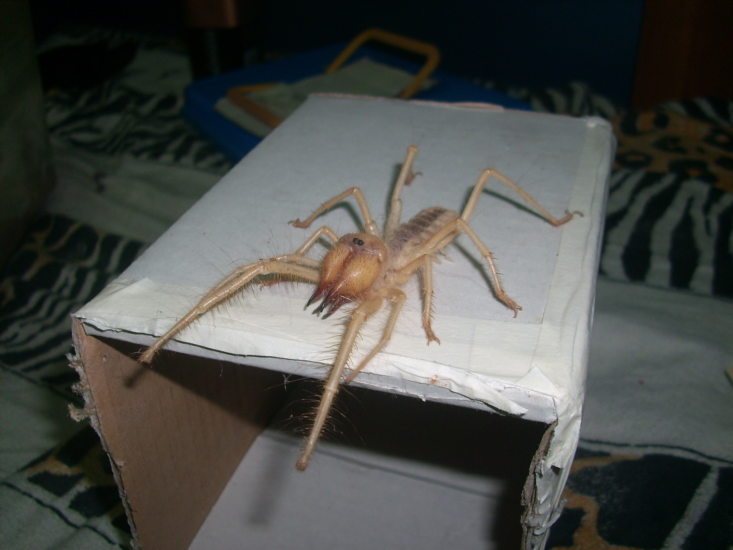 מבעיתן נוצר על ידי משתמש:1silver